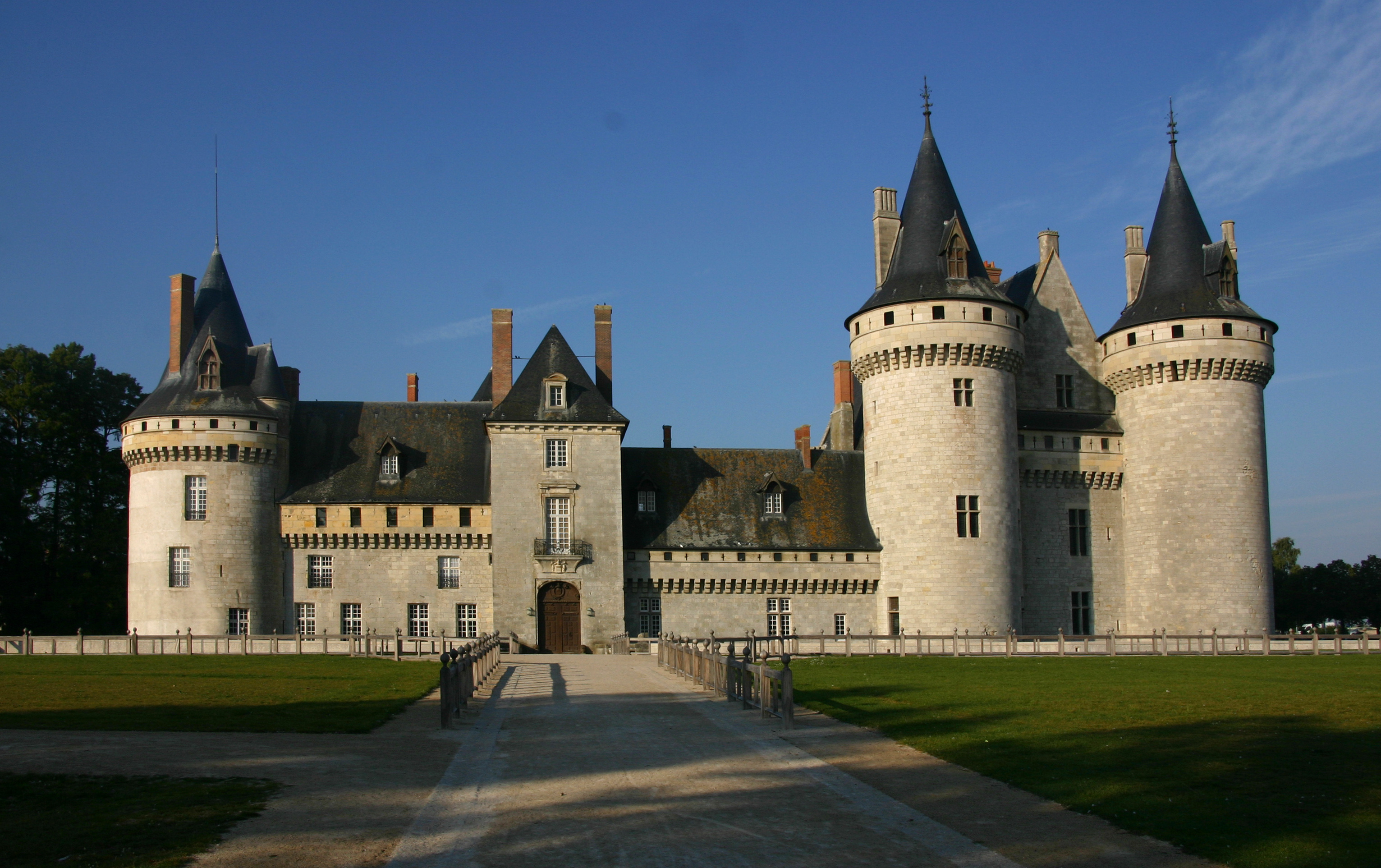 Schloss Sully-sur-Loire